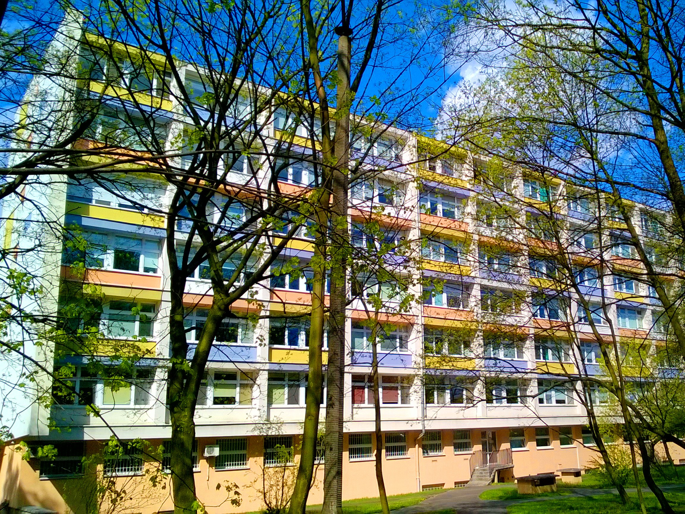 Wojewódzki Szpital Zespolony im. Ludwika Rydygiera w Toruniu66